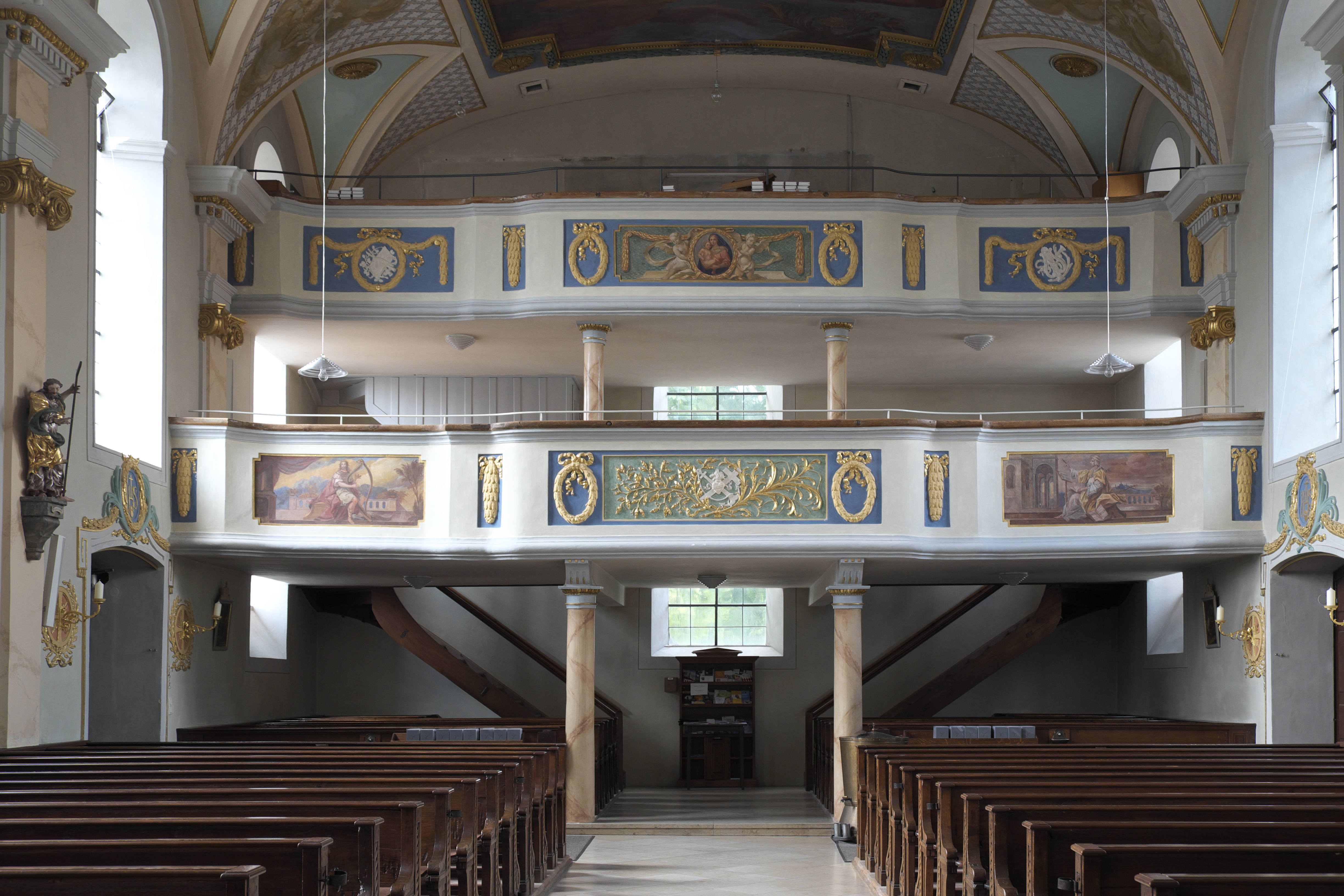 Katholische Pfarrkirche St. Jakob in Mammendorf im Landkreis Fürstenfeldbruck (Bayern/Deutschland), klassizistische Westempore